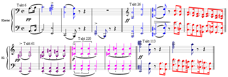 Takte aus Franz Schuberts Klaviersonate a-Moll, op. 143 (DV 784)